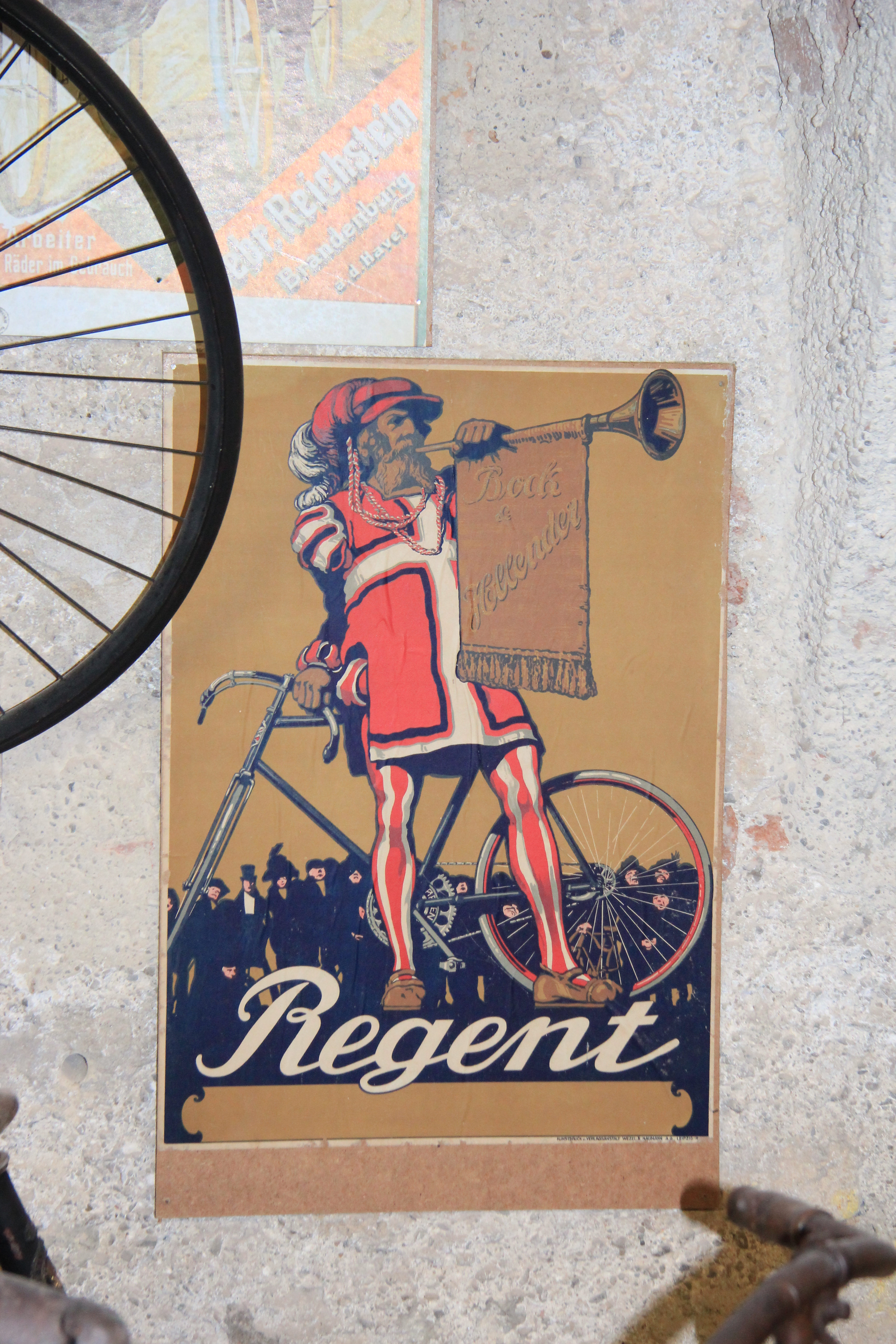 Ausstellungsstücke vorrangig österreichischer Provinienz im Fahrradmuseum in Vösendorf, NIederösterreich